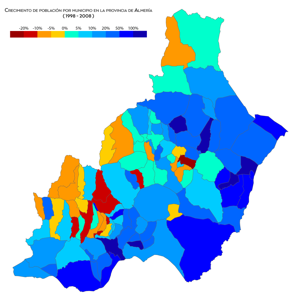 Crecimiento de la población por municipio en la provincia de Almería entre los años 2008 y 2018